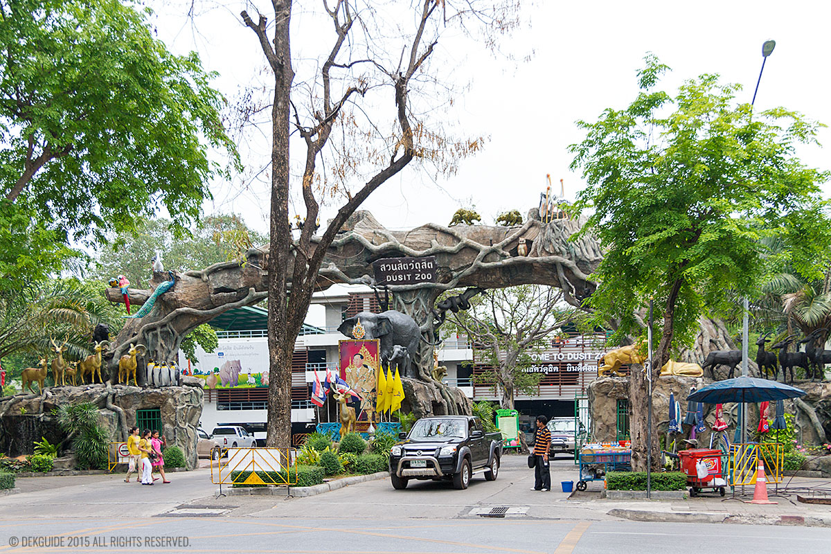 Place around the mansion